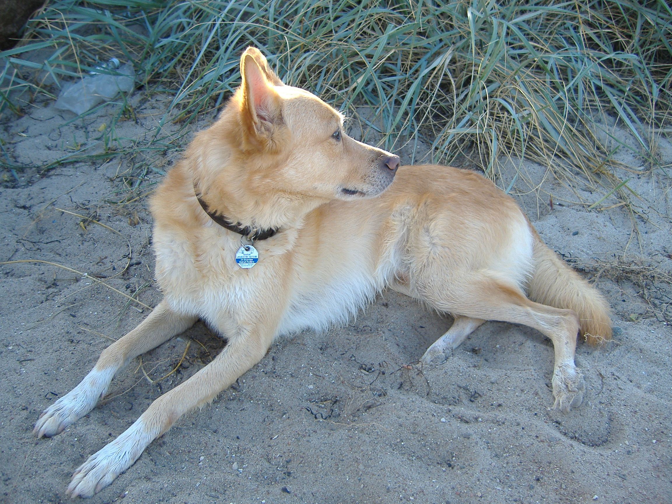 Die Hunderasse Podengo Português Medio.